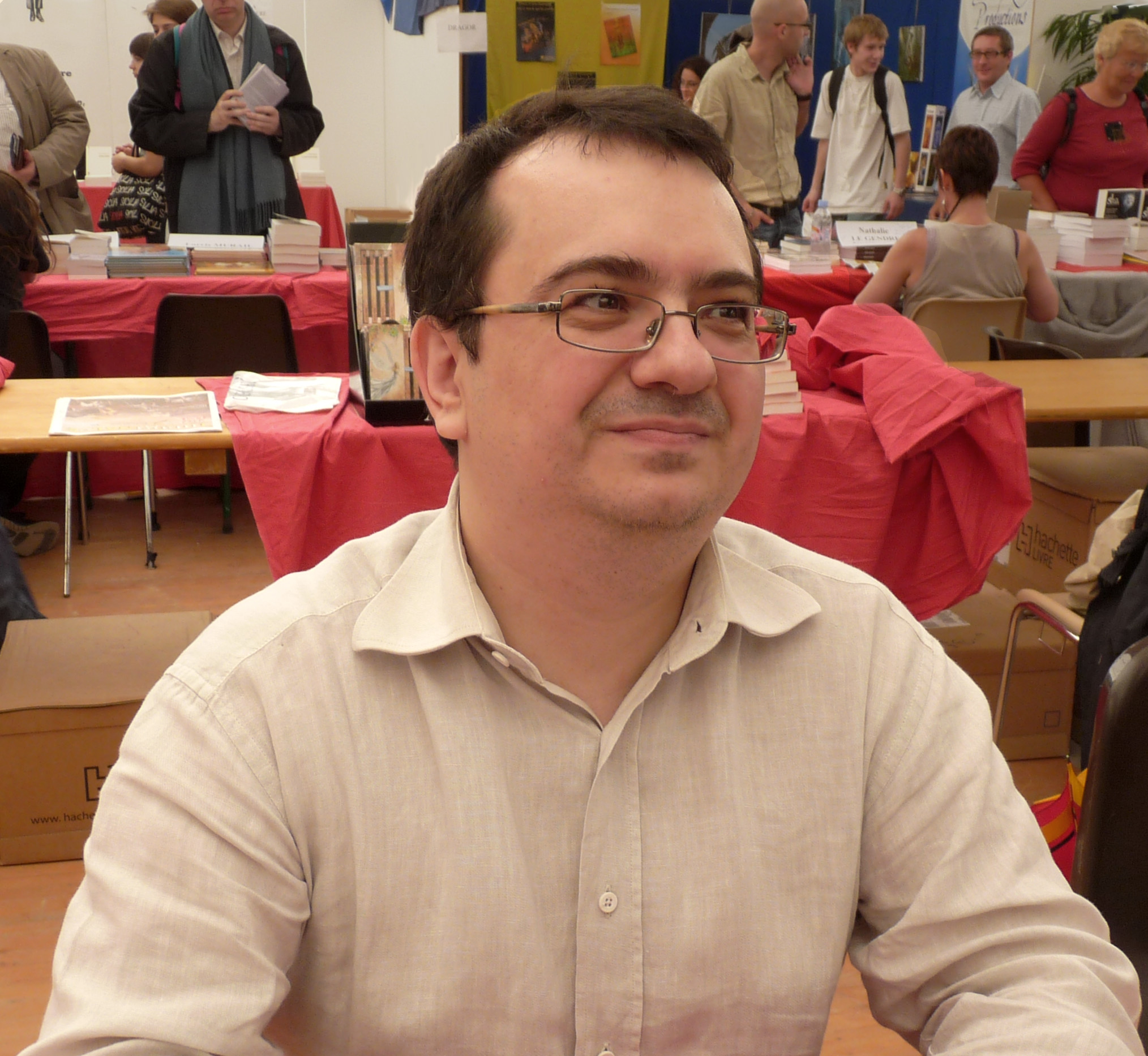 Pierre Pevel (Imaginales 2010, Epinal).